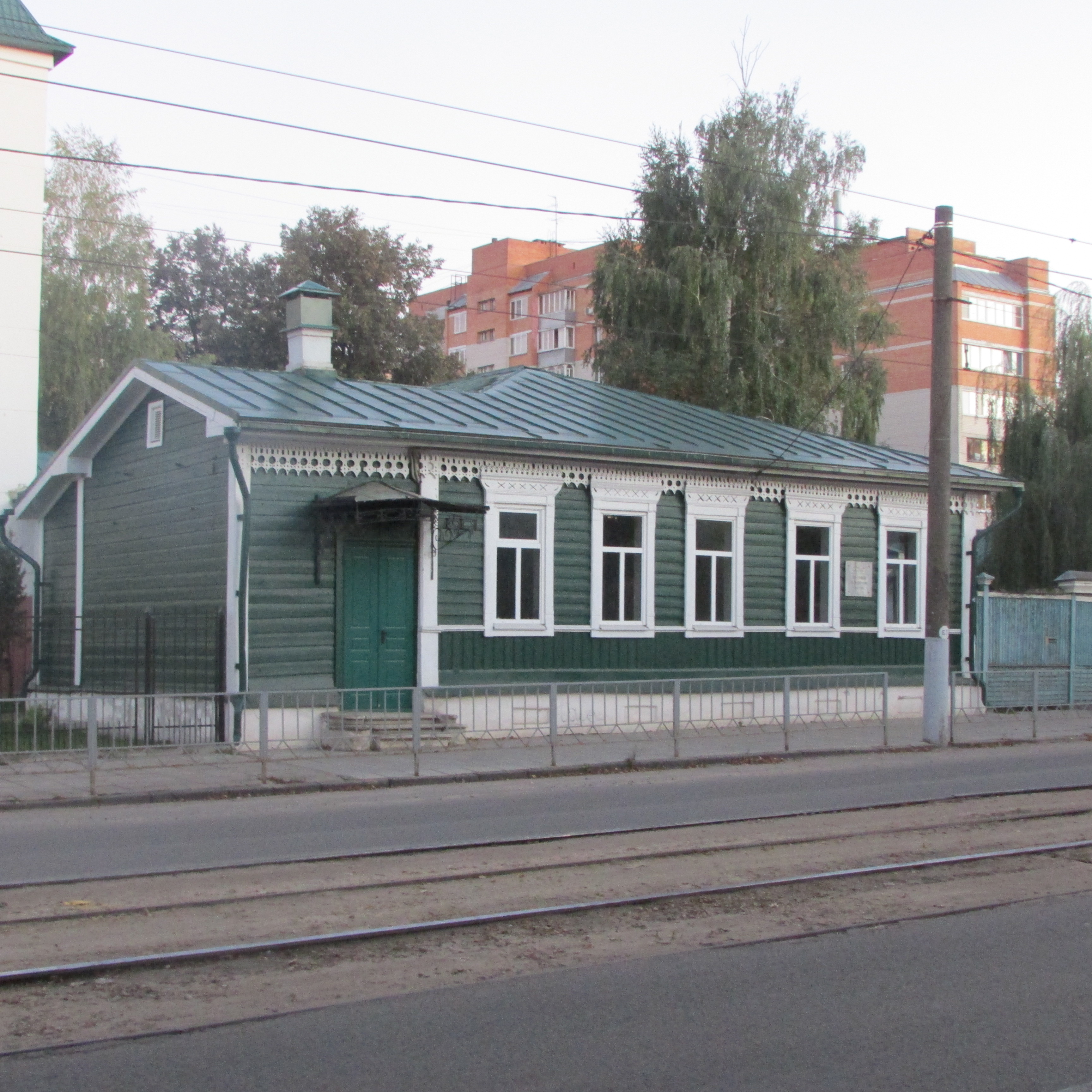 Дом, в котором родился и жил поэт П.П. Потемкин: улица Сакко и Ванцетти, 57 (ныне Карачевская улица), Орёл, Орловская область